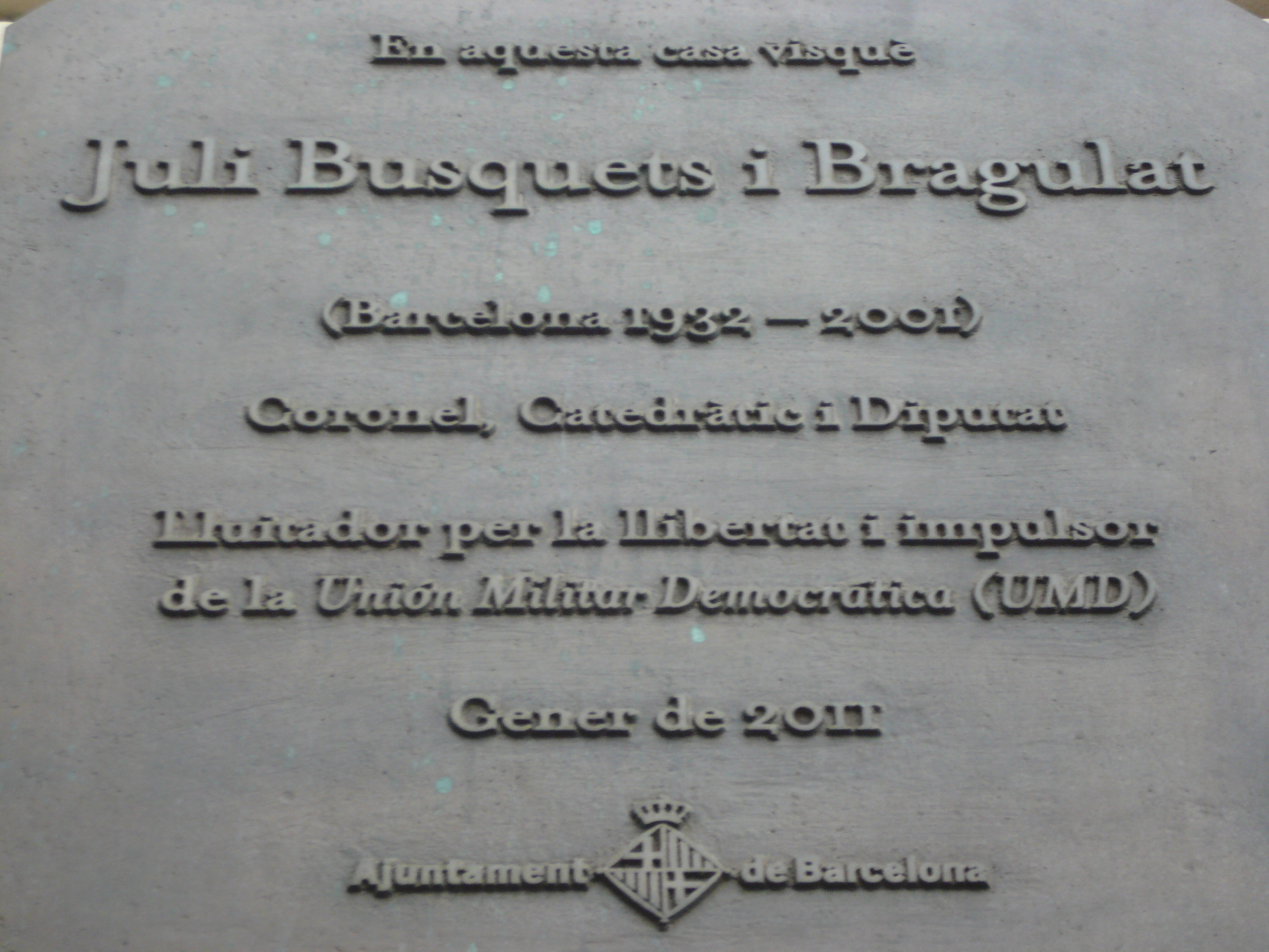 Juli Busquets i Bragulat. C. Laforja, 19 (Barcelona) 95″ N, 2° 08′ 59.31″ E